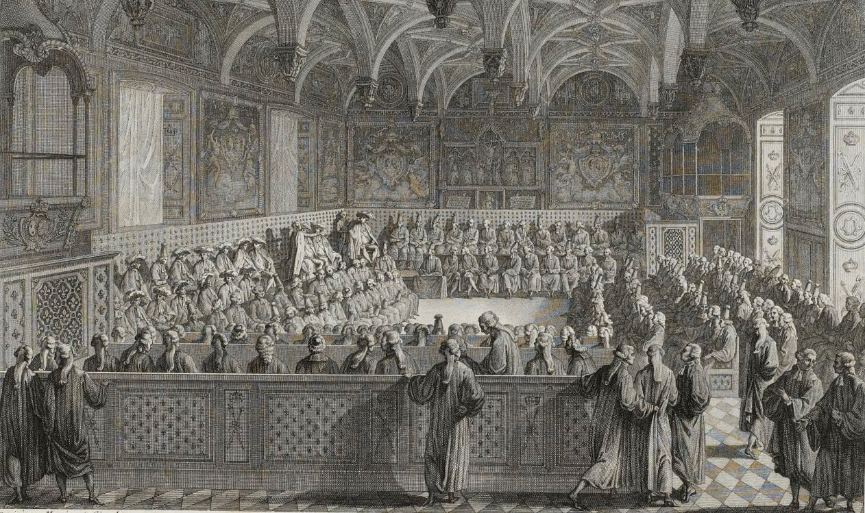 Séance extraordinaire du parlement, en présence du roi Louis XVI, tenue le 19 novembre 1787 au palais de justice de Paris afin de voter un emprunt sur cinq ans.